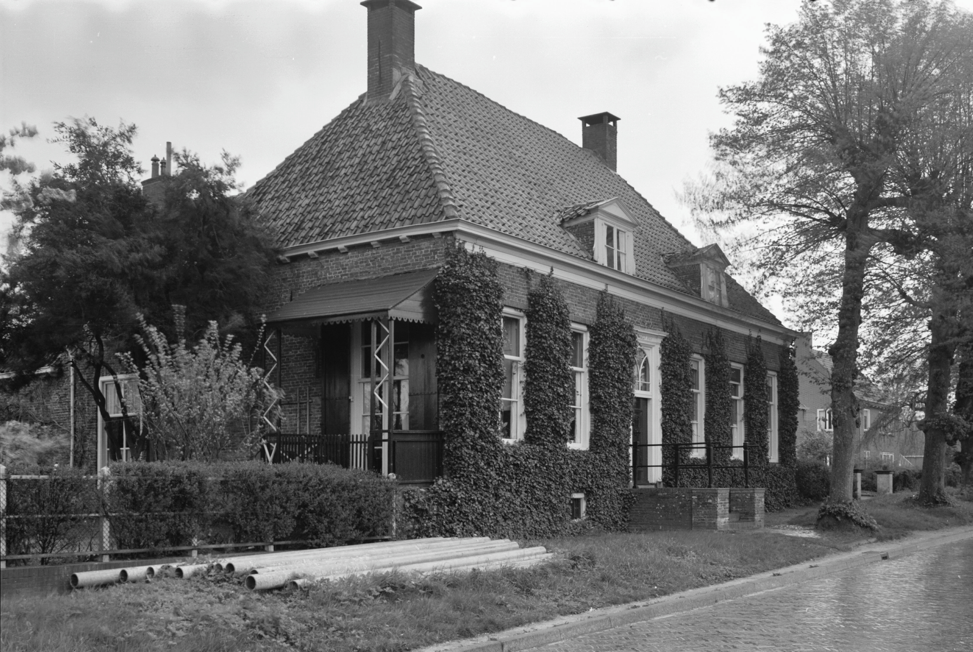 Drostehuis aanzicht